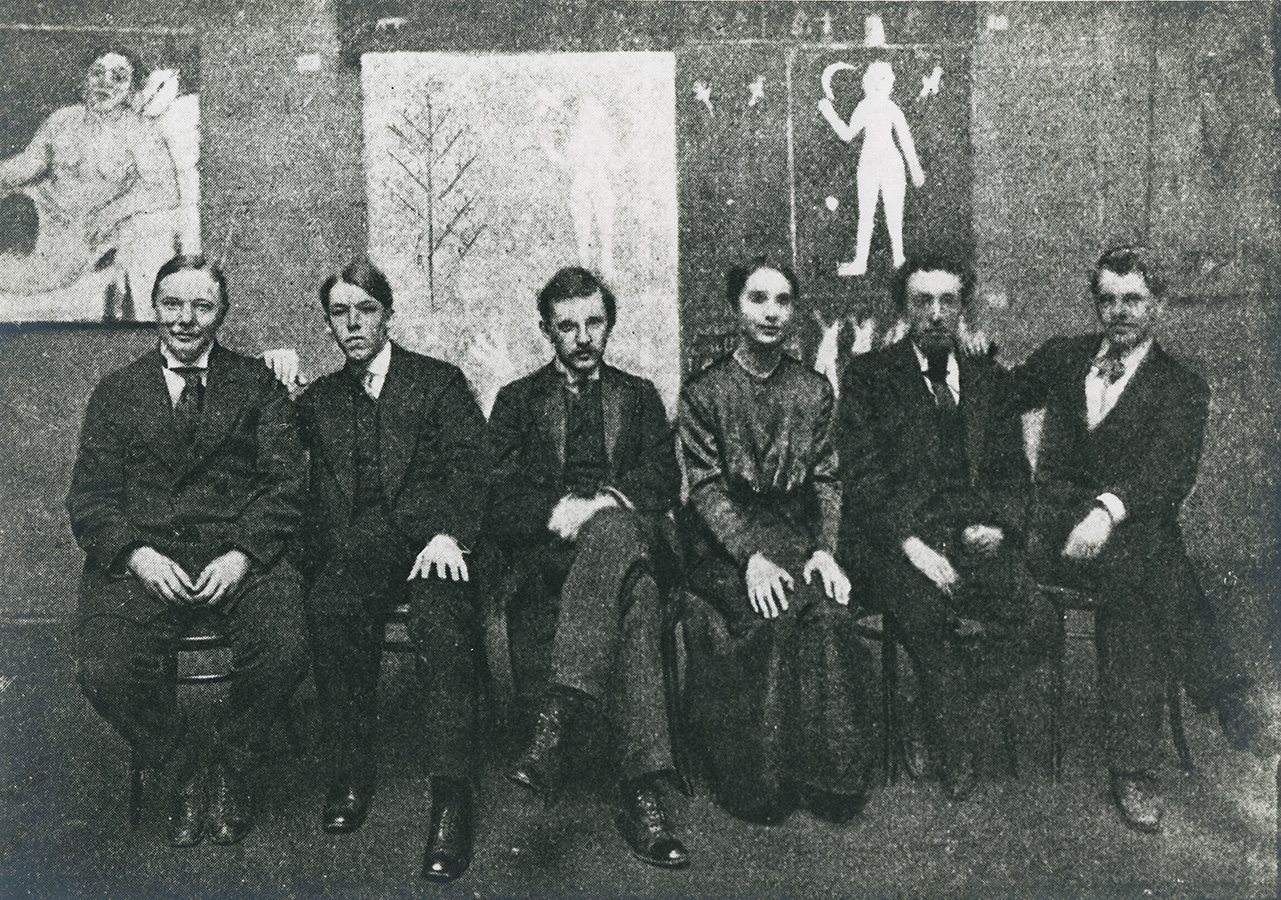 Группа художников (М.Ф. Ларионов, С.М. Романович, В.А. Оболенский, Н.С. Гончарова, М. Фаббри, А.В. Шевченко) на выставке «Ослиный хвост». Фотография. 1913